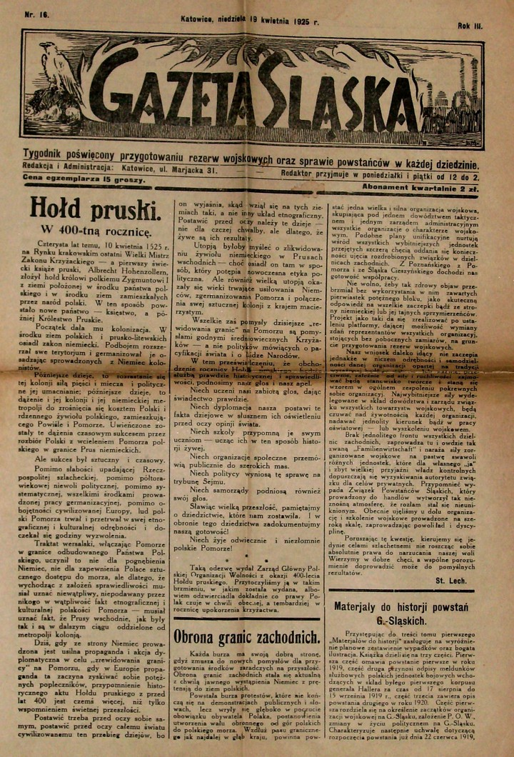 Gazeta Śląska z 1925, nr 16, s. 1